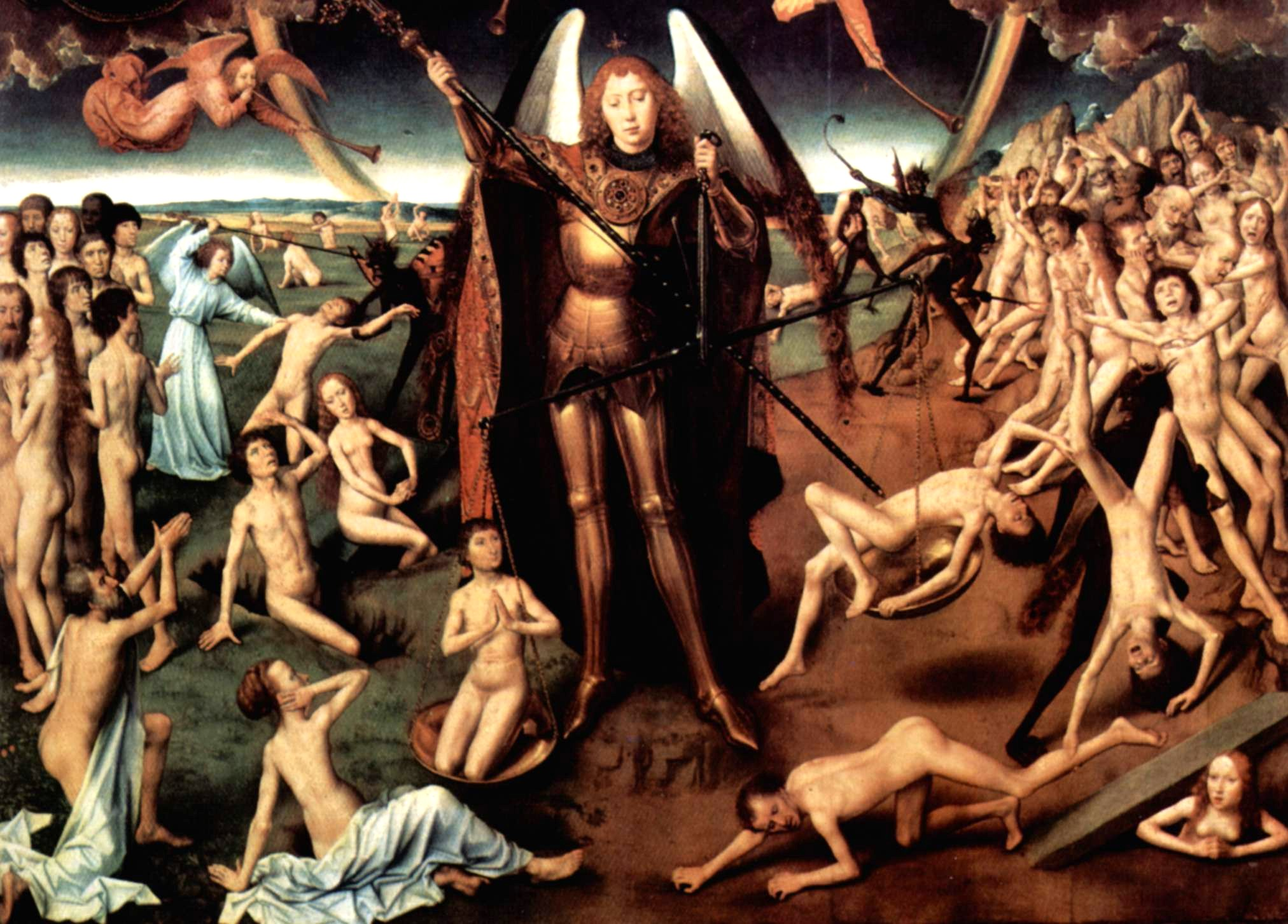 Das Jüngste Gericht, Triptychon, Mitteltafel: Maiestas Domini und Erzengel Michael mit der Waage, der die Seelen der Auferstandenen wiegt, Detail: Erzengel Michael